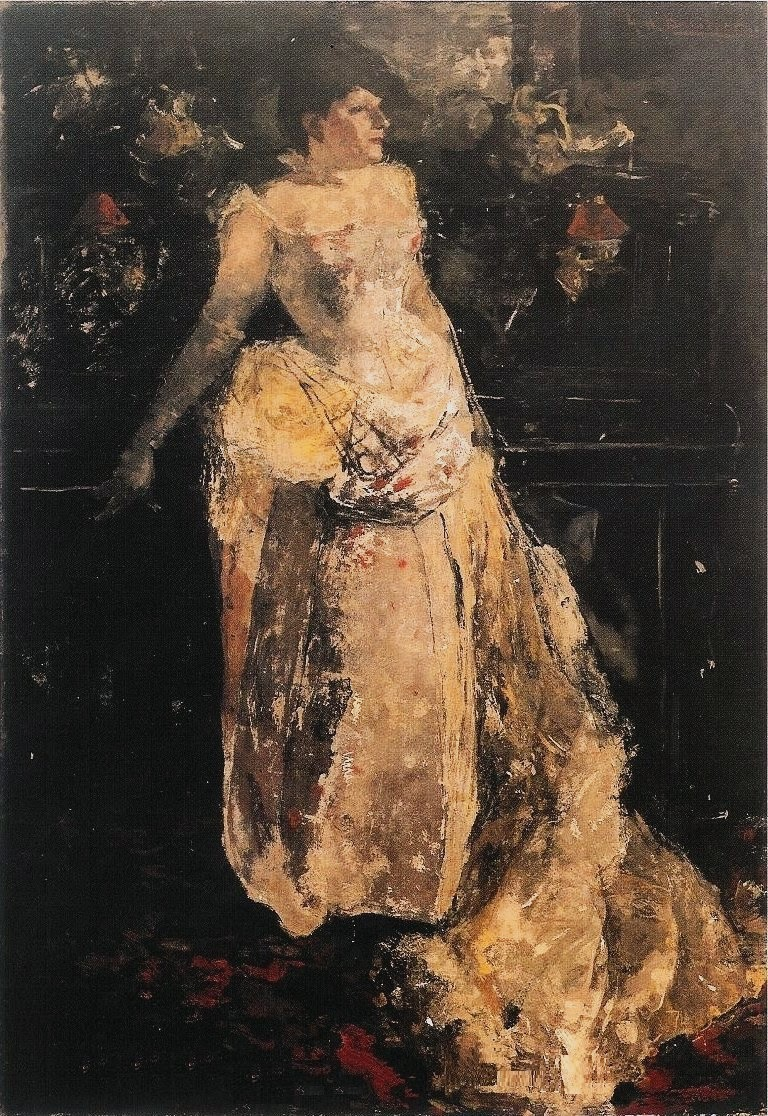 Actrice Theo Mann-Bouwmeester in de rol van Francine de Riverolles oil on canvas 1887 217 x 152 cm. signed u.r. G.H. Breitner